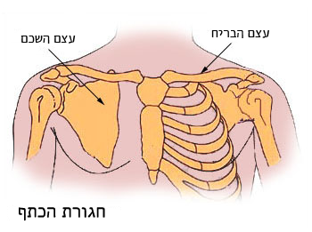 חגורת הכתף